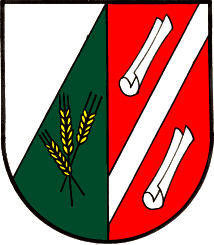 Wappen der Gemeinde Gratkorn in Österreich